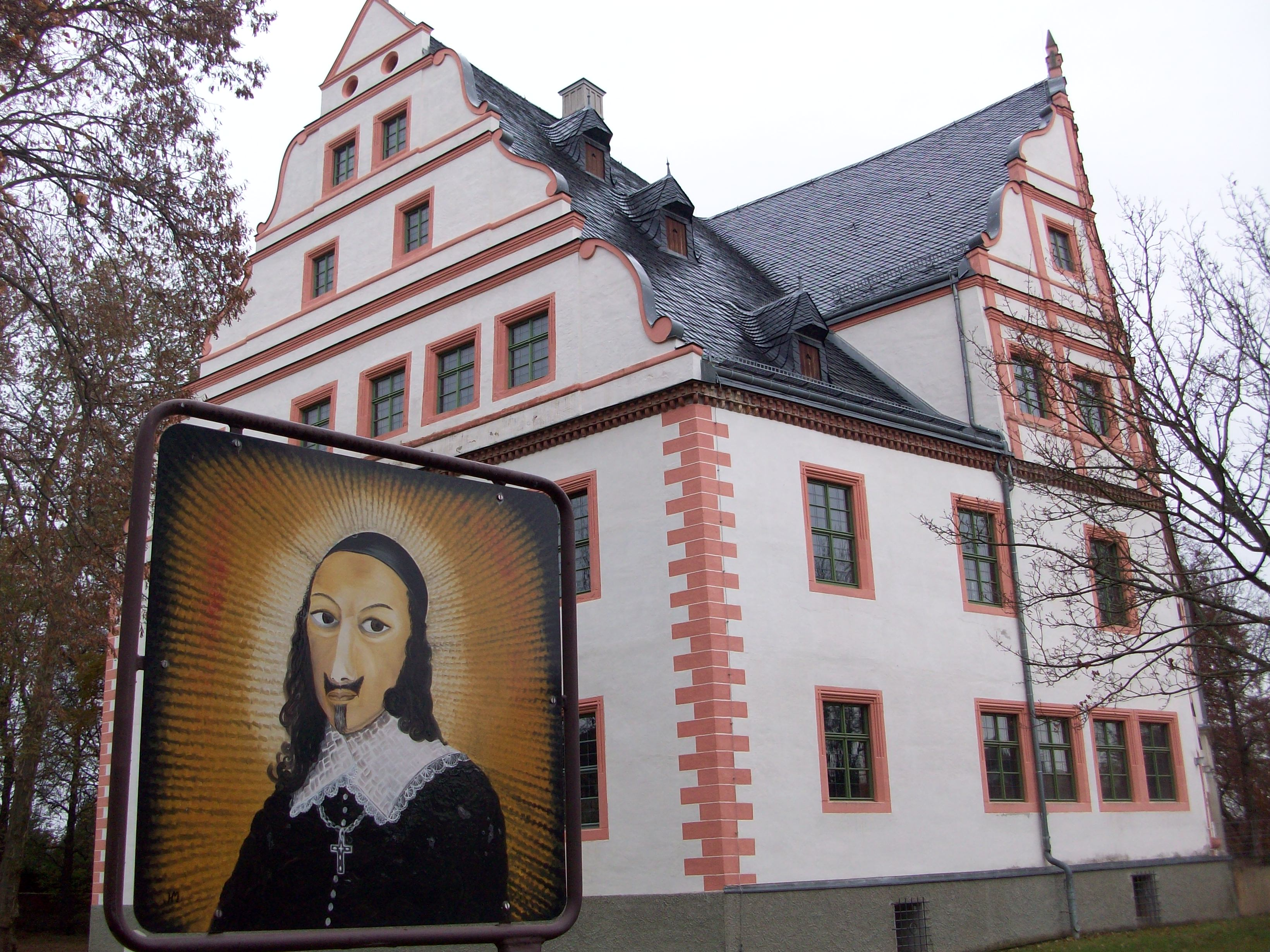 Das Renaissanceschloss in Ponitz mit dem gemalten Bildnis des berühmtesten Schlossherren von Ponitz: Wolfgang Conrad von Thumbshirn